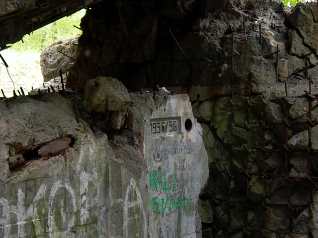 Grupa warowna "Ludendorff" / Werkgruppe "Ludendorff"